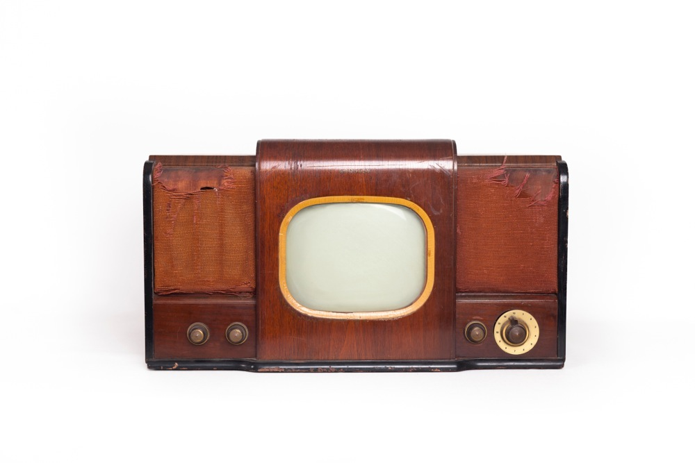 הטלוויזיה הראשונה, מוצג מתוך מוזיאון לתקשורת, ביה"ס סמי עופר לתקשורת, הבינתחומי הרצליה